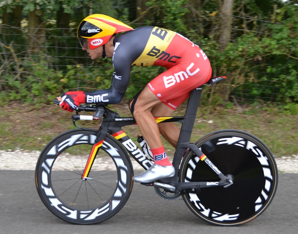 Philippe Gilbert TDF2012